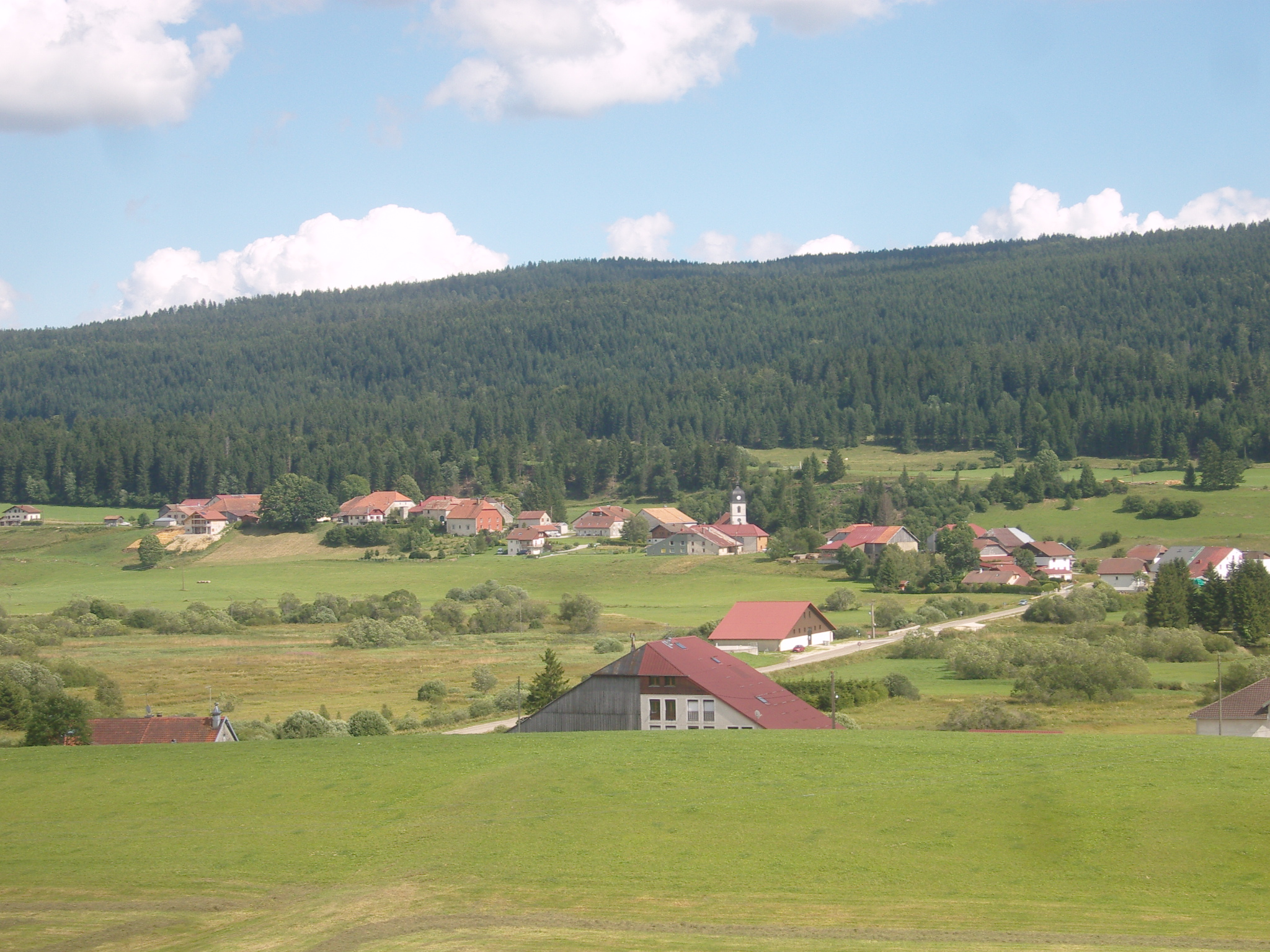 Les Villedieu, vue générale sur le hameau de Villedieu-lès-Mouthe, depuis les hauteurs de Gellin